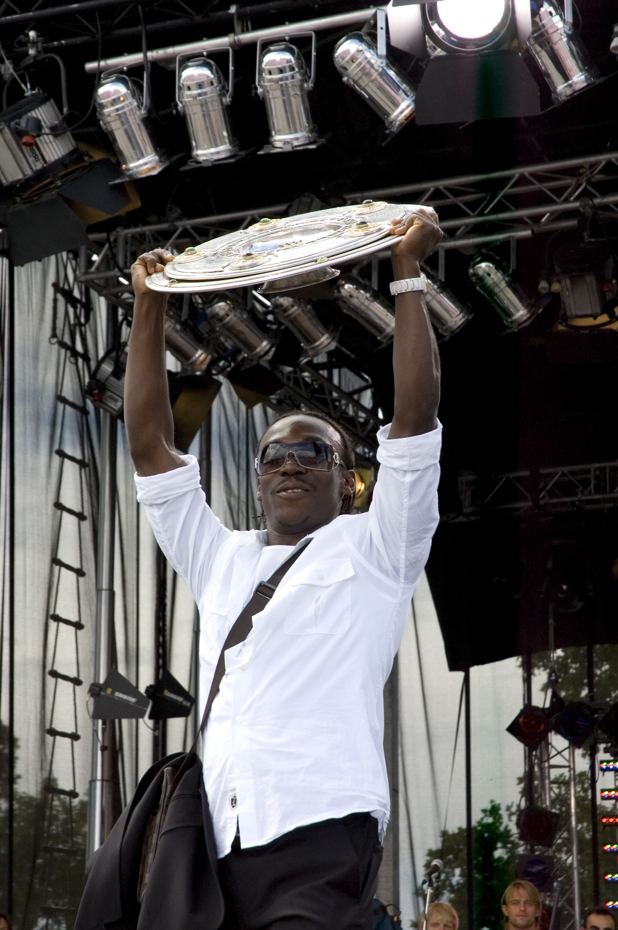 Arthur Boka